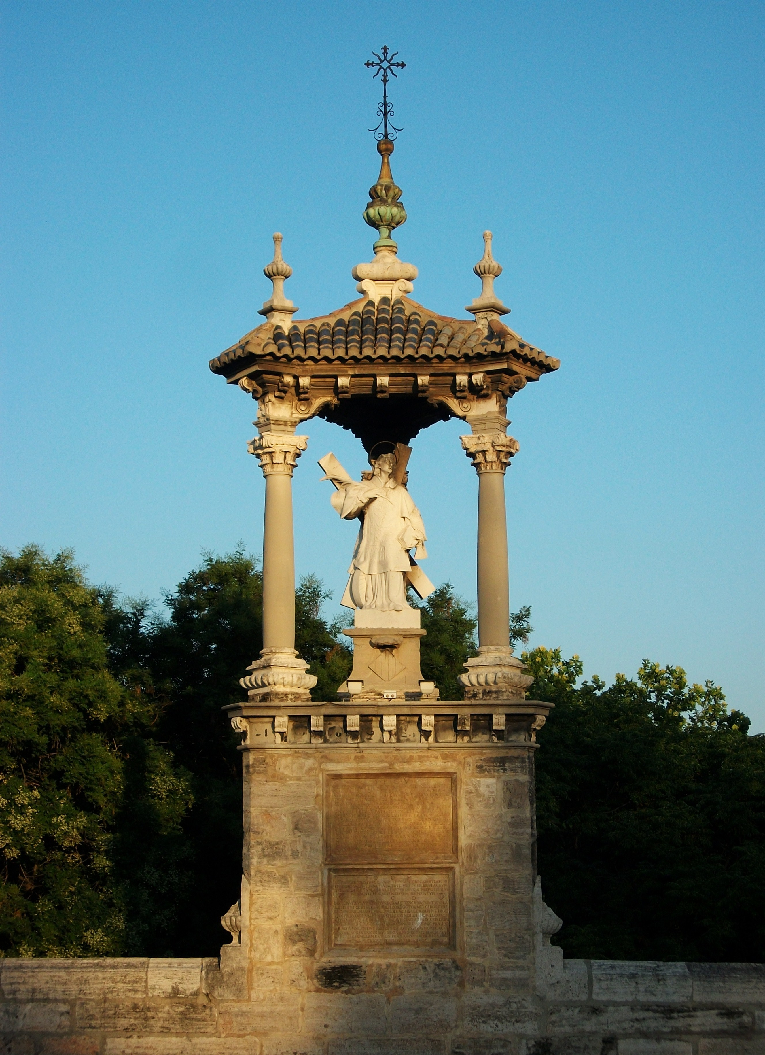 Casalici amb estàtua de sant Vicent Màrtir, pont del Real de València.